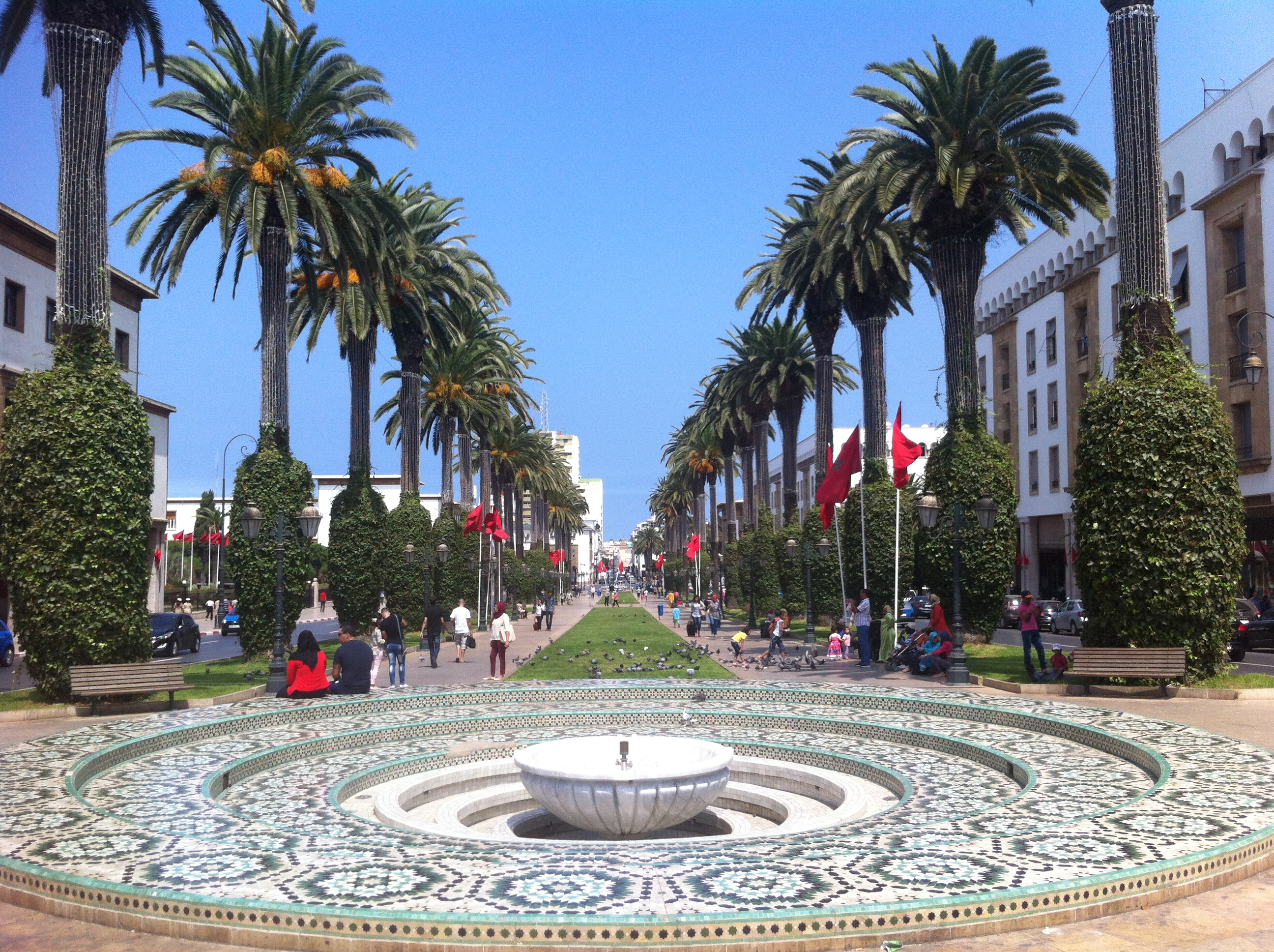 Avenue Mohammed V, Rabat